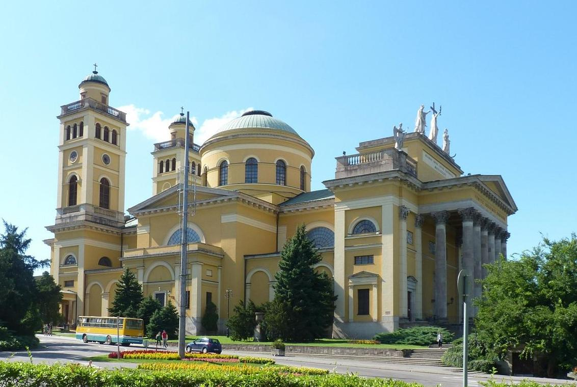 Székesegyház (Szent János apostol és főangyal, Szent Mihály főangyal) (Eger, Eszterházy Károly tér 3.) This is a photo of a monument in Hungary, Identifier: 5554